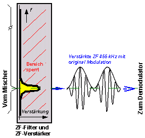 Signalverlauf Superheterodyne ZF-Stufe